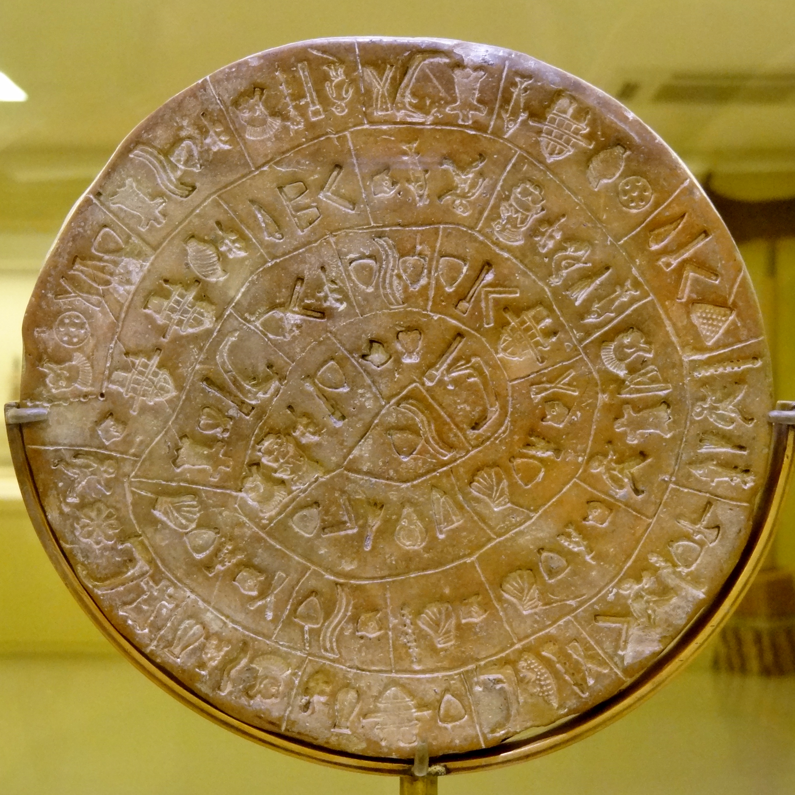 Der am 3. Juli 1908 in der Ausgrabungsstätte von Phaistos gefundene Diskos von Phaistos (Seite B), ausgestellt im Archäologischen Museum Iraklio, Kreta, Griechenland